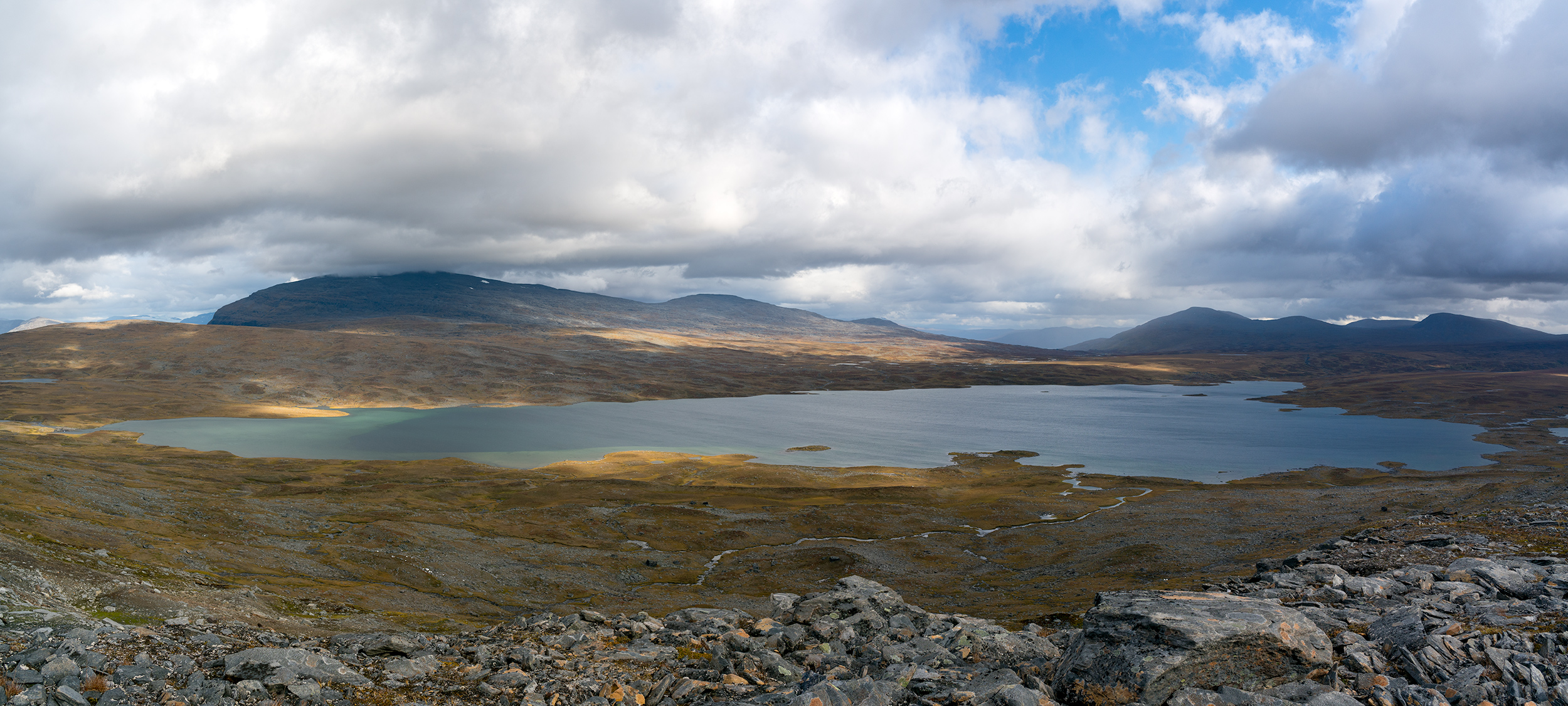 Gálbejávrre - vy från Rähtjáttjåhkkå.